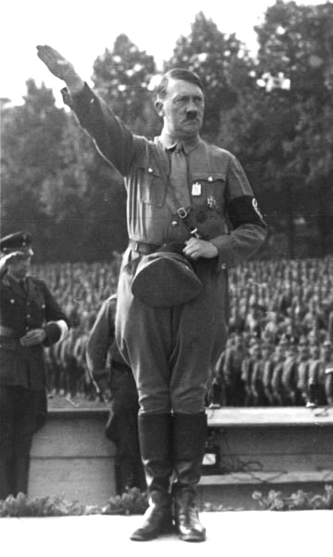 Nürnberg: Stabschef Röhm meldet die SA an Hitler, Reichsparteitag 1933